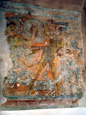 Mural Iglesia San Miguel Arcángel, Ixmiquilpan, Hidalgo